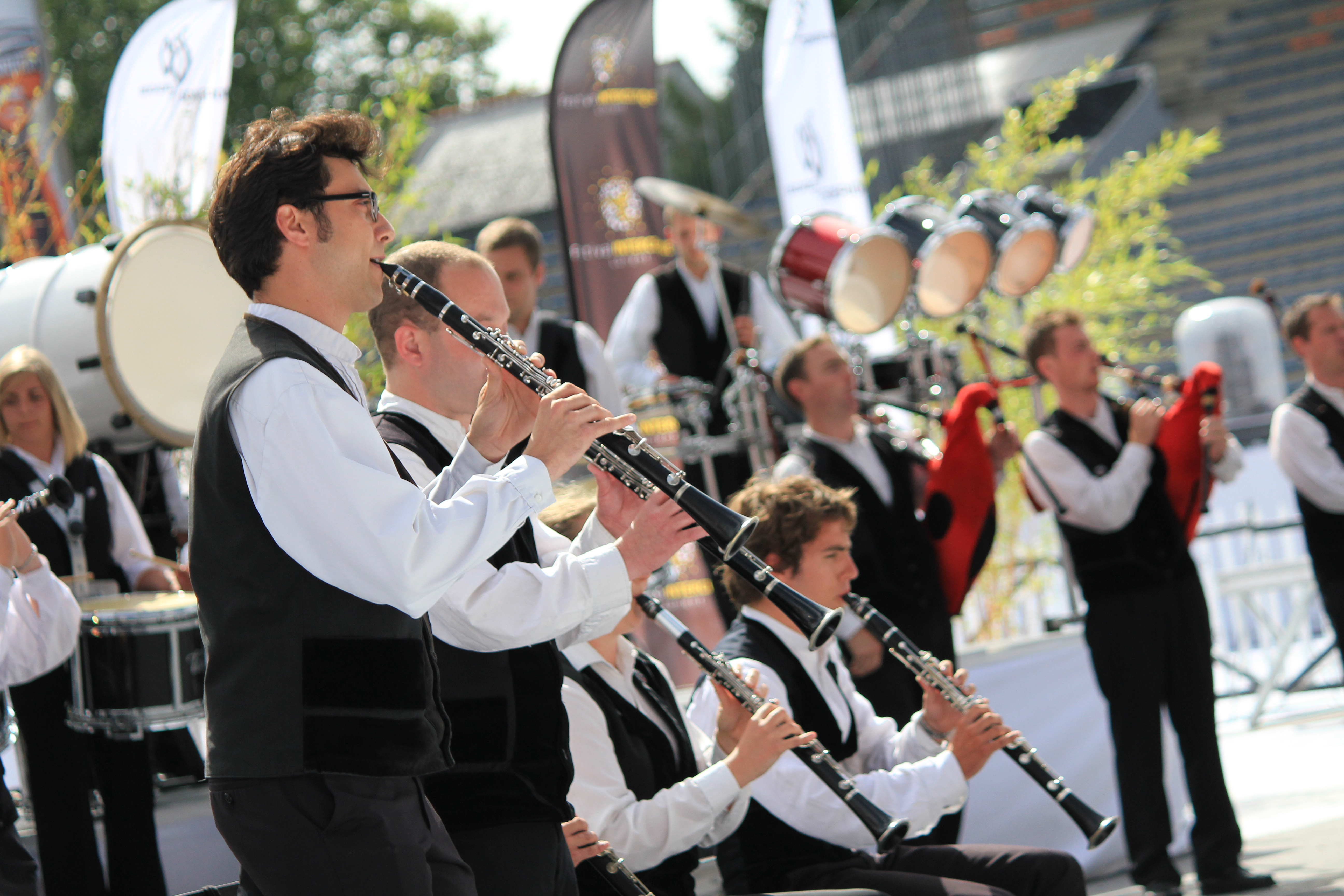 La Kevrenn Alre d'Auray lors de l'épreuve d'été du championnat national de bagadoù de 1ère division, organisé dans le cadre du Festival interceltique de Lorient, France.